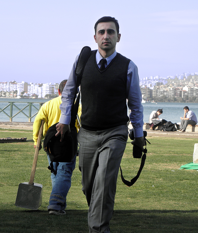 Fatih TAKMAKLI